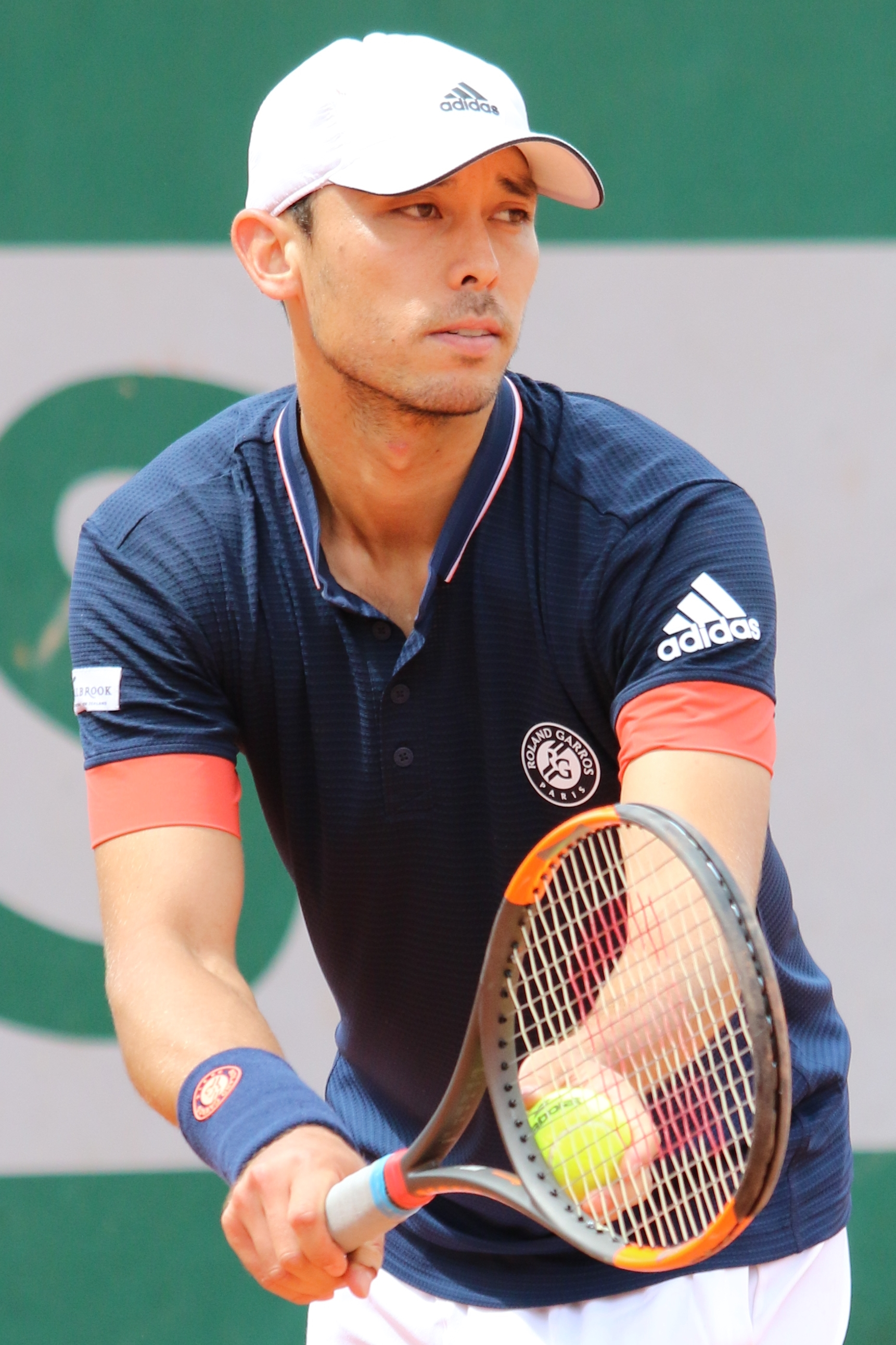 McLachlan RG18 (7)